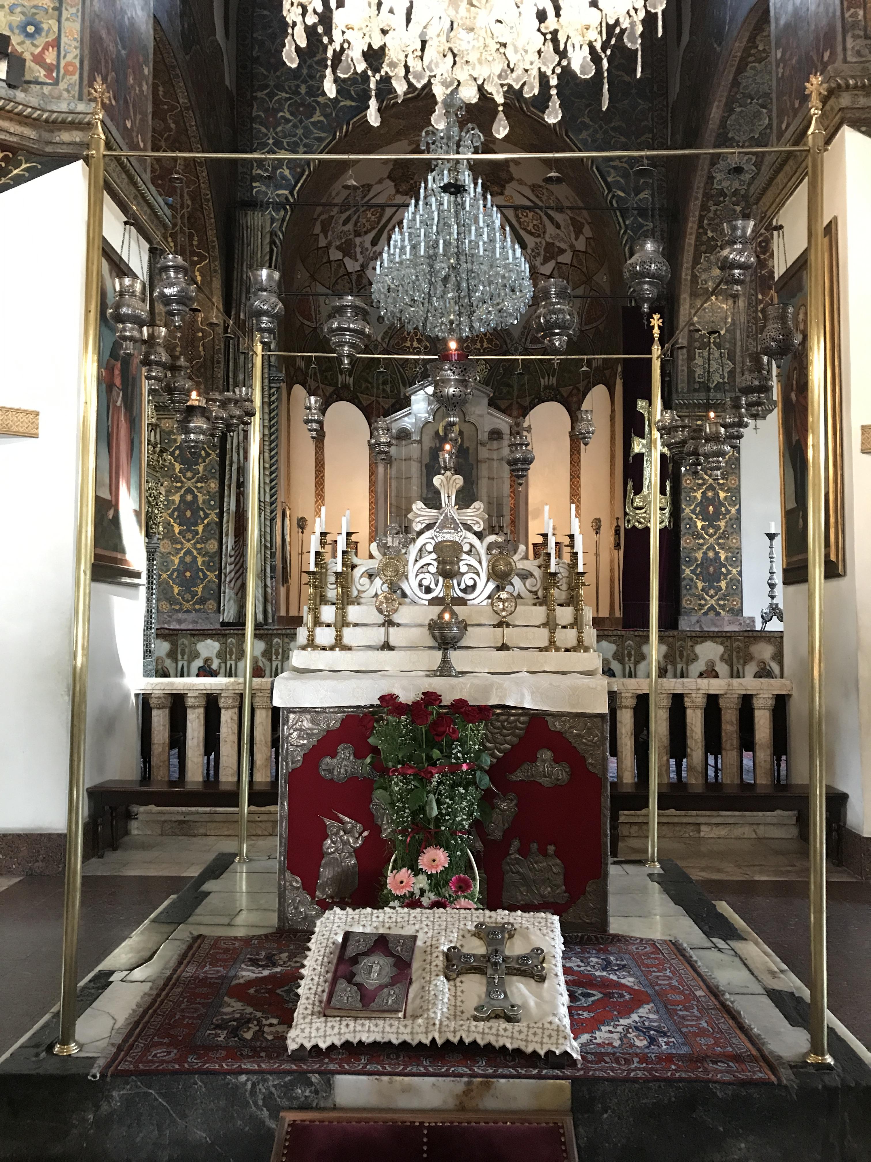 Image du Saint-Siège d'Etchmiadzin.